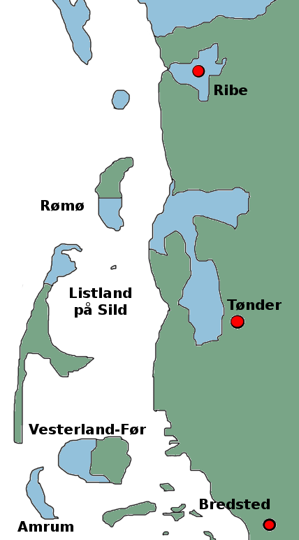 Kongeriske enklaver med danske stednavne, based on the work File:Kongerigske-Enklaver.png by Lars Helbo